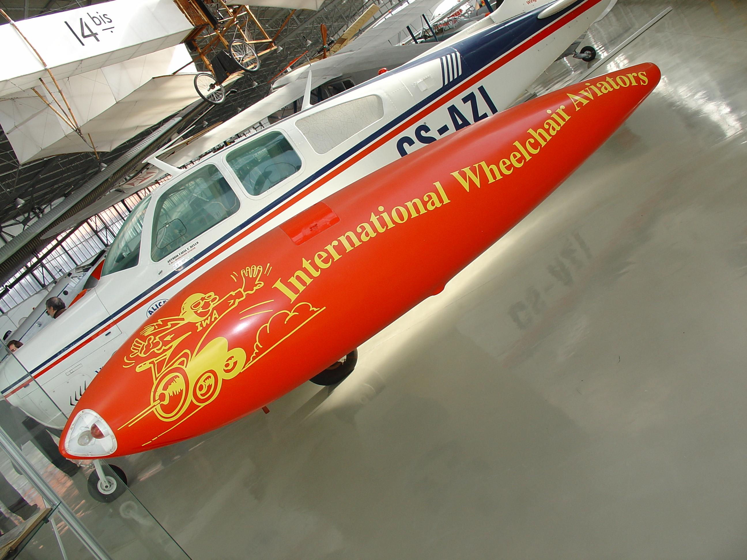 Museu do Ar, novas instalações em Sintra